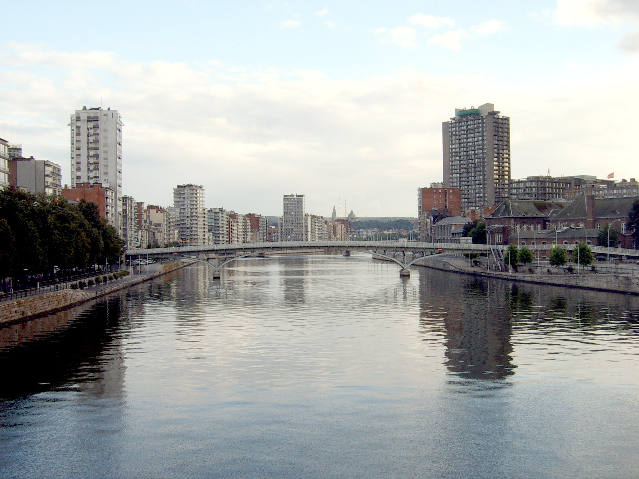 Passerelle Saucy, Liège, Belgium